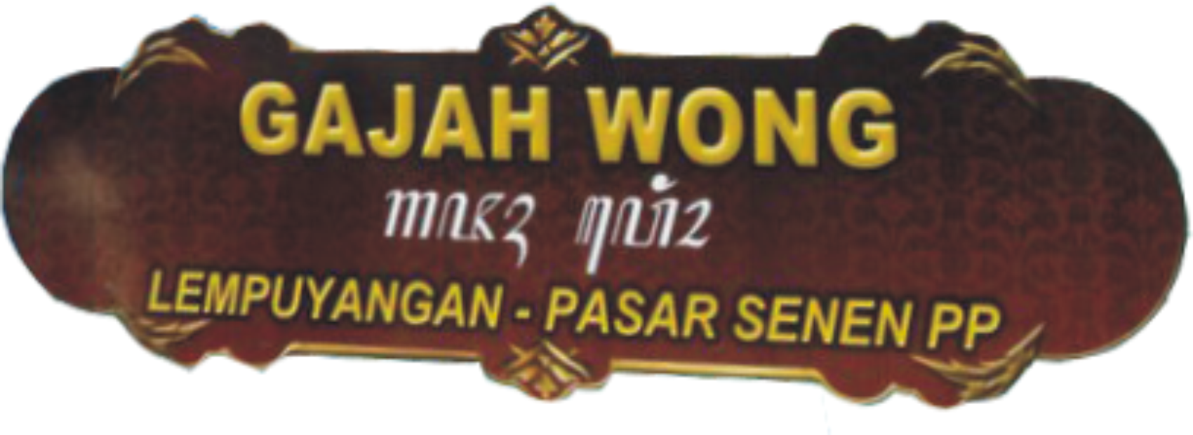 Logo dari Kereta api Gajah Wong.